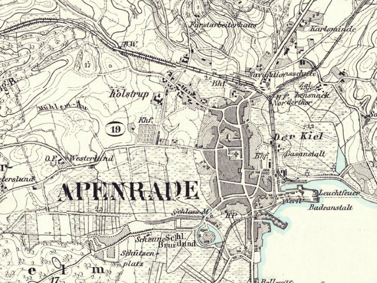 Apenrade um 1900